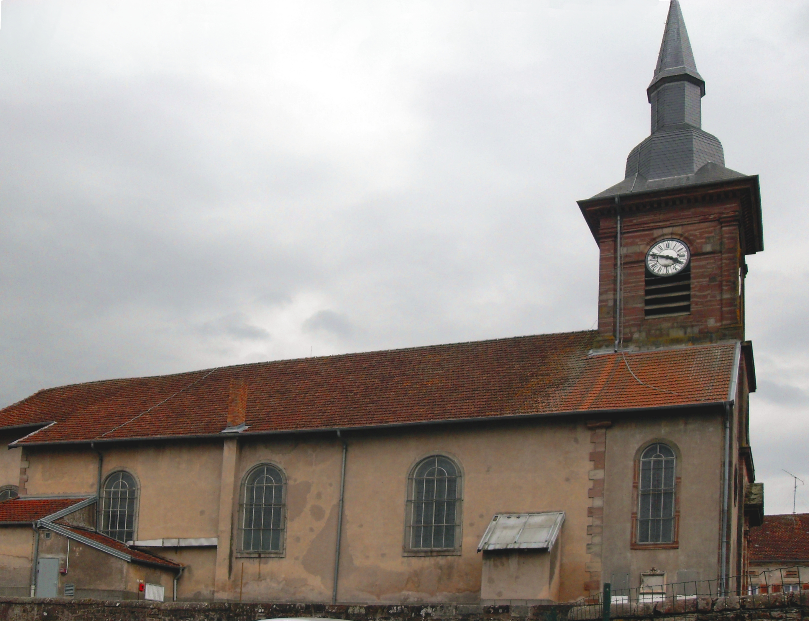 L'église Saint-Pierre-aux-Liens de Pexonne, côté nord-puest